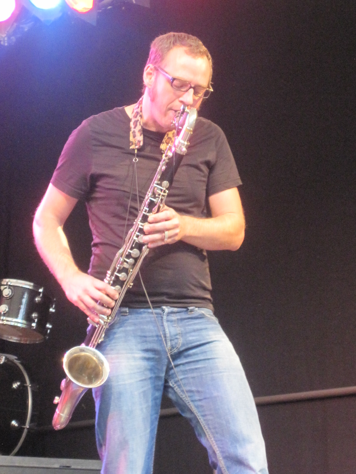 Frank Spaniol, german bass clarinetist